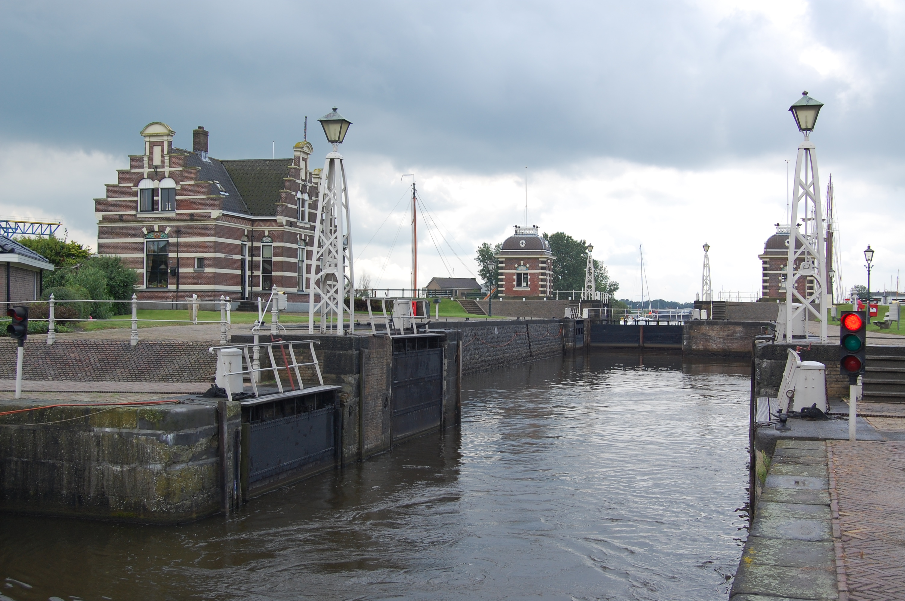 De grote sluis in Lemmer (Lemstersluis) die toegang geeft van het IJsselmeer naar de binnenwateren van Friesland.